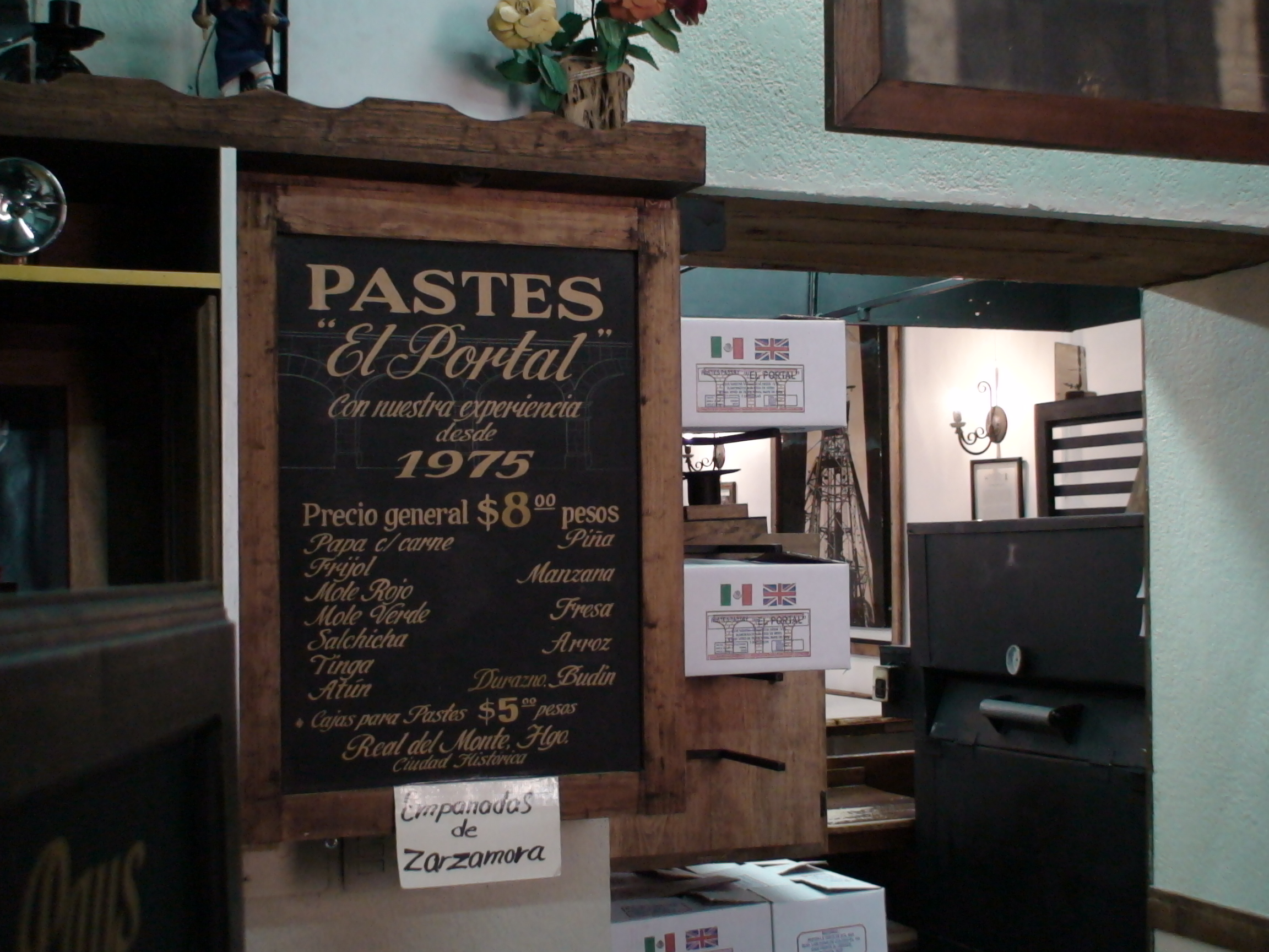 Paste El Portal en Real del Monte, Hidalgo, México